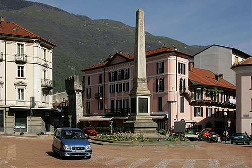 Piazza Indipendenza mit Unabhängigkeits-Denkmal in Bellinzona